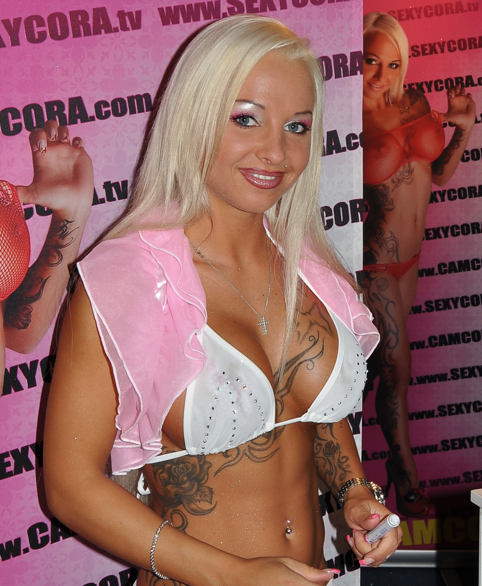 Sexy Cora (Carolin Wosnitza) bei einer Autogrammstunde auf der Venus 2010 in Berlin